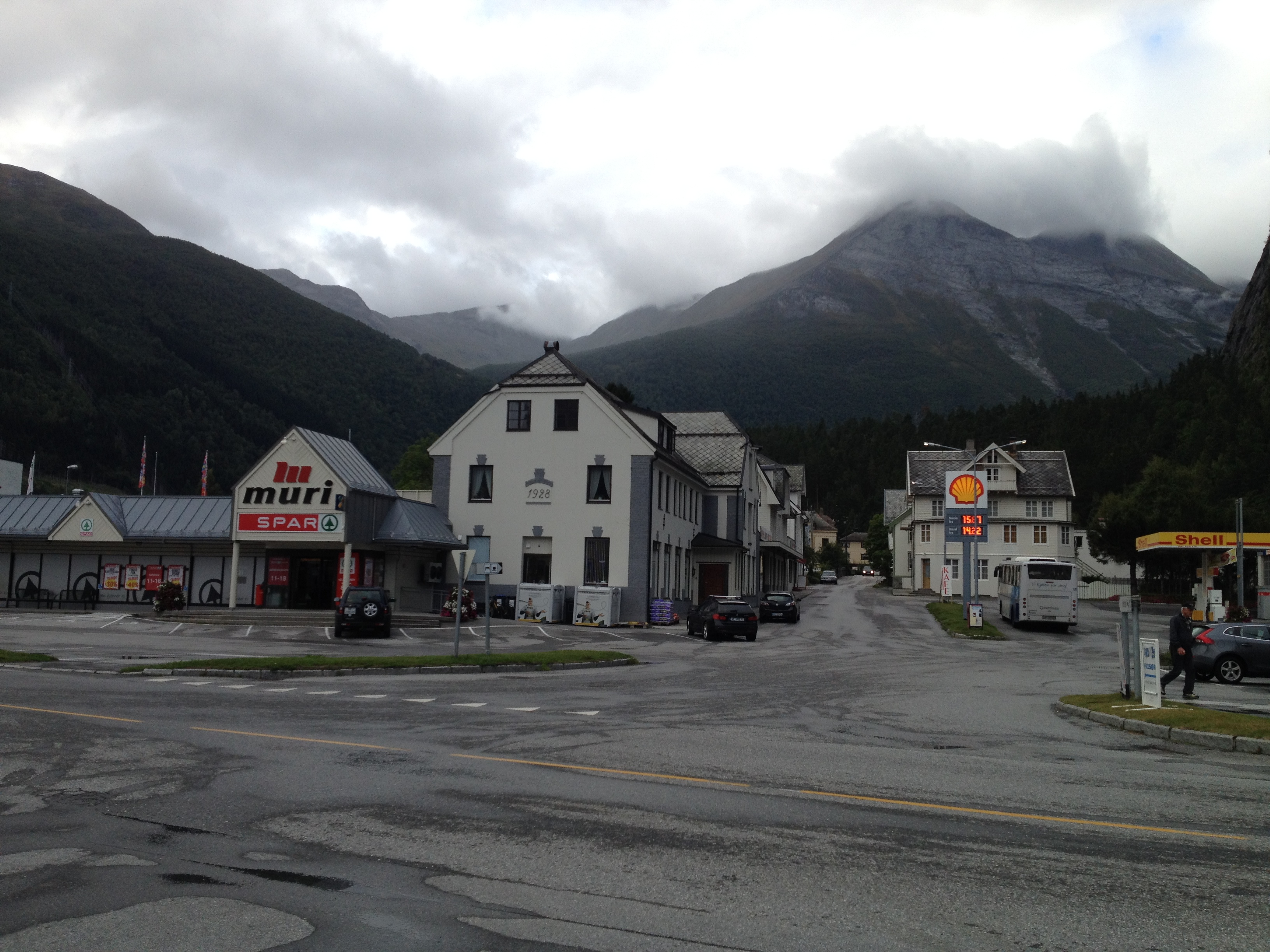 Valldal i Møre og Romsdal.